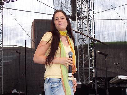 Die Sängerrin Chantal bei einem LIVE Auftritt!